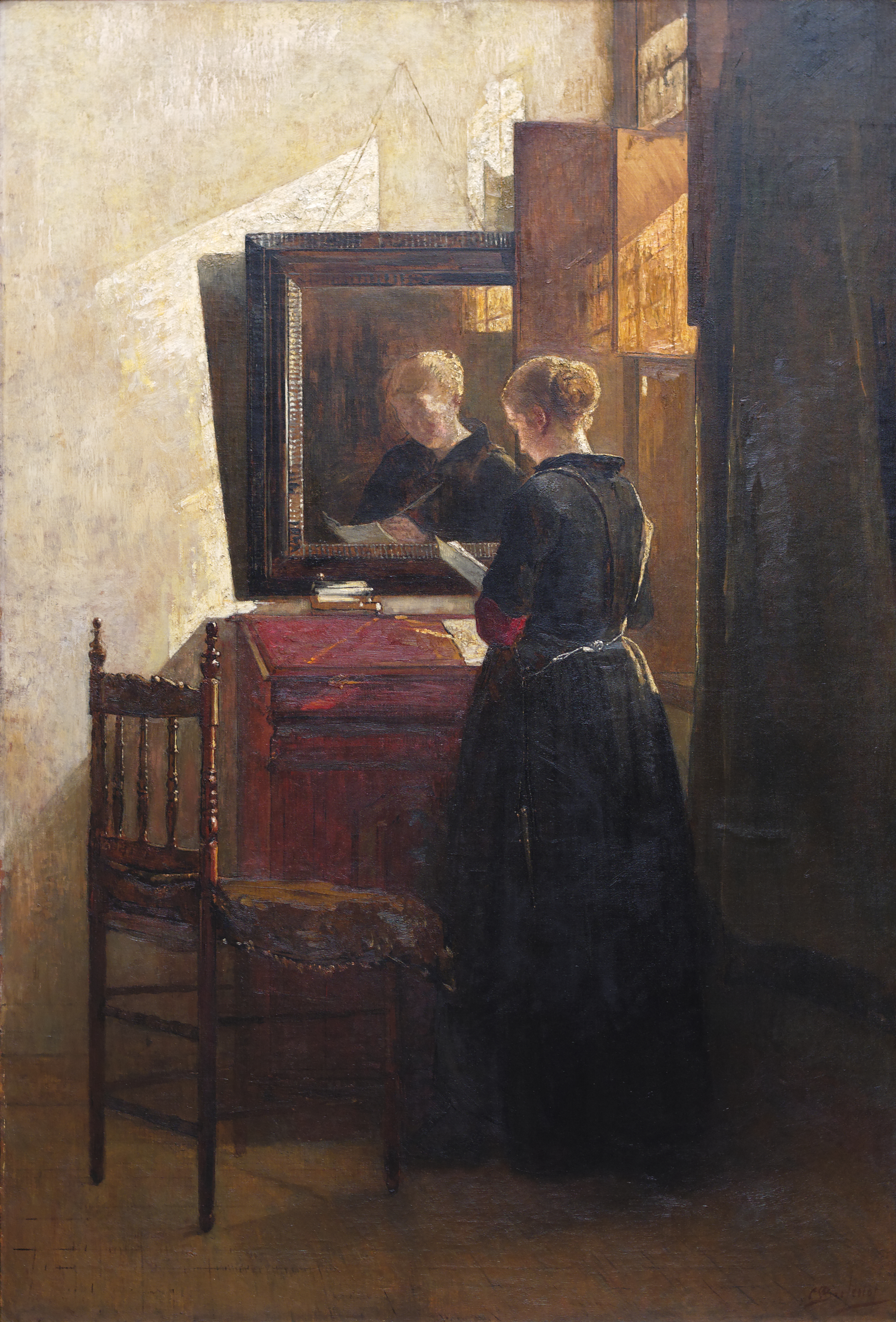 Soleil dans la maison et au cœur. Christoffel Bisschop, c 1885-90. Neue Pinakothek, Munich. Inv.Nr. 7792